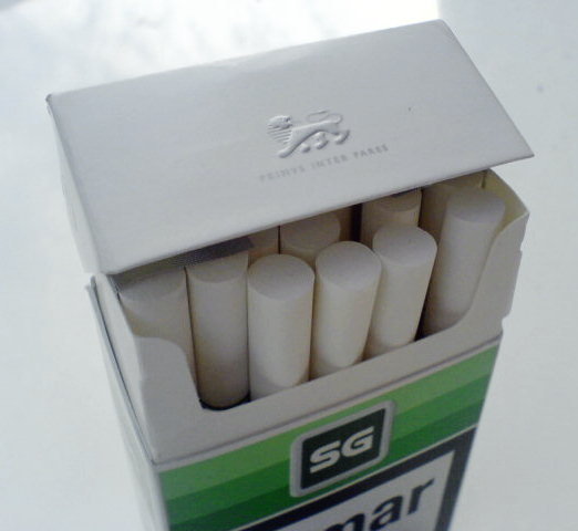 pakje (witte) sigaretten